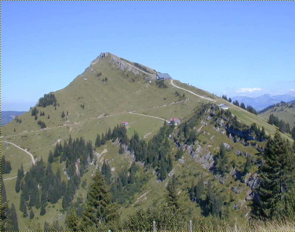 Westgrat des Hochgrats vom Seelekopf